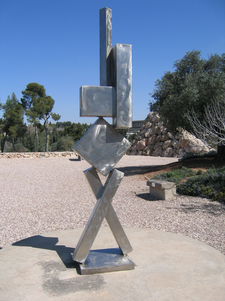 פיסול